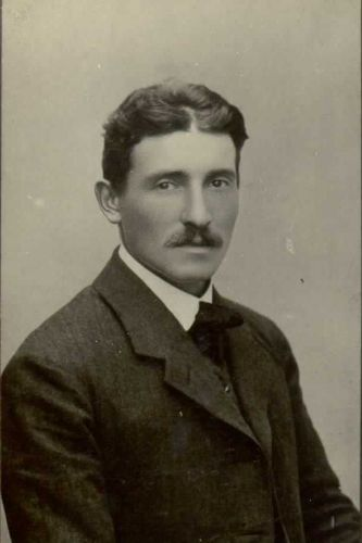 Bogumil Brinšek (1884-1914)